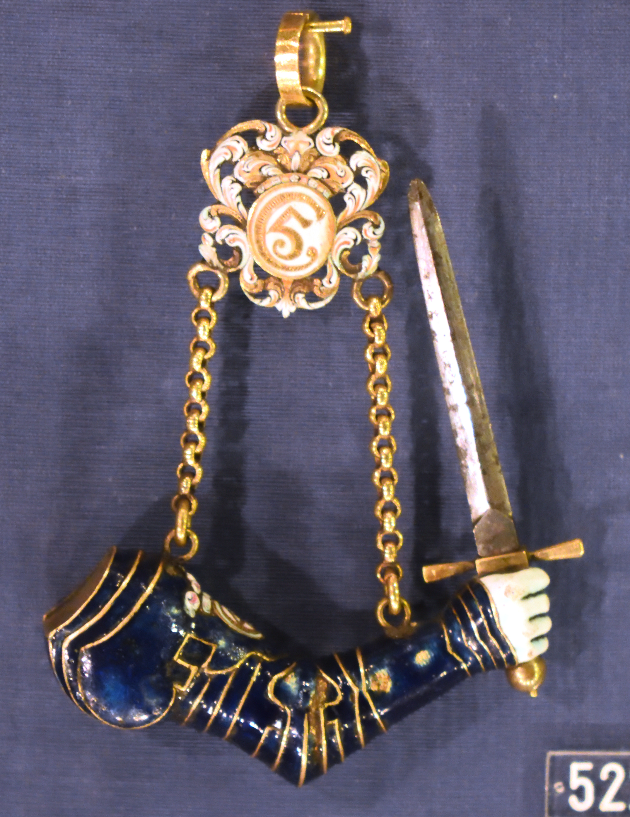 Order Zbrojnego Ramienia, prototyp 1, eksponat z Muzeum w Rosenborgu, Kopenhaga